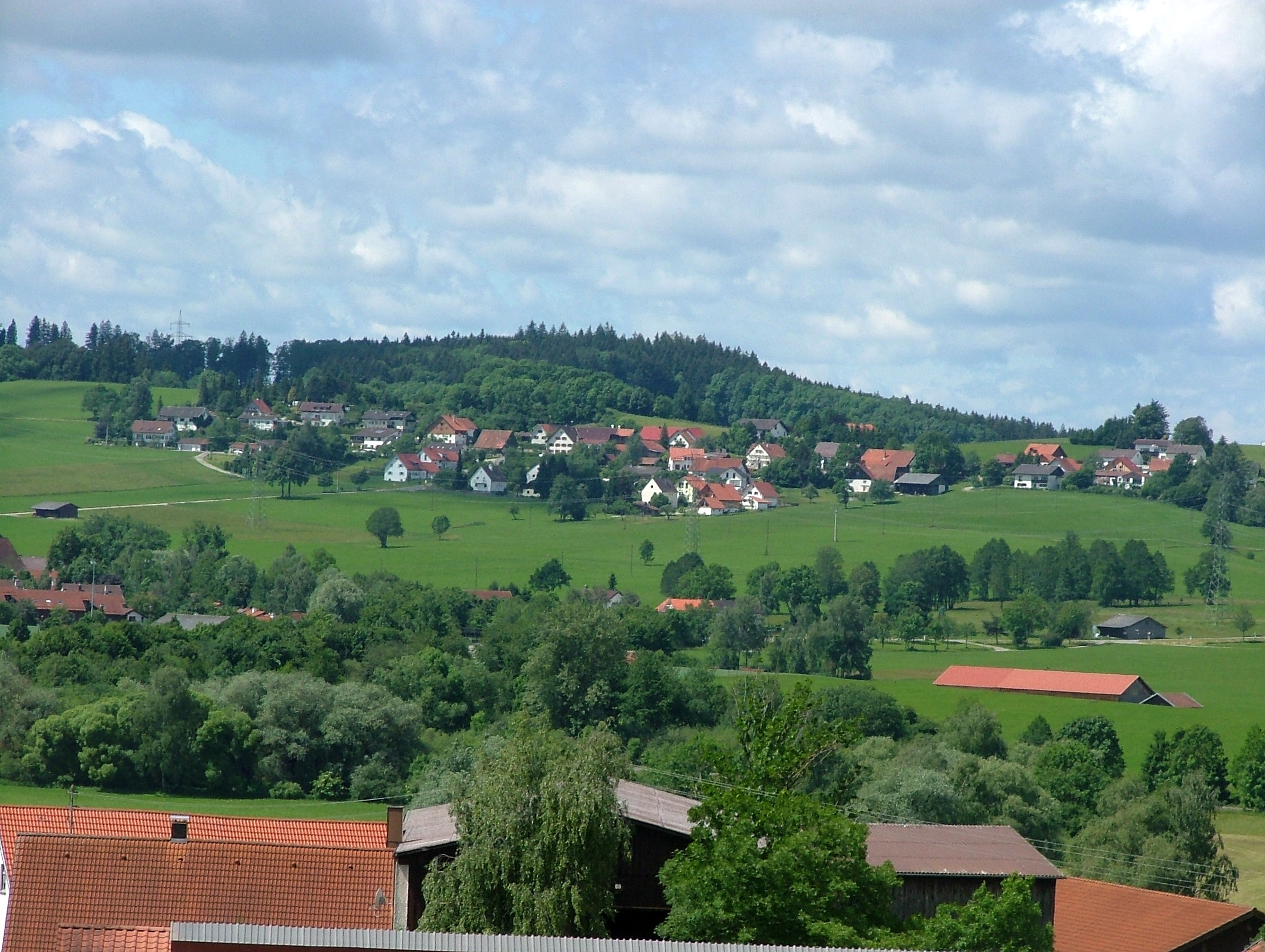 Brüchlns, gesehen von Fröhlins aus